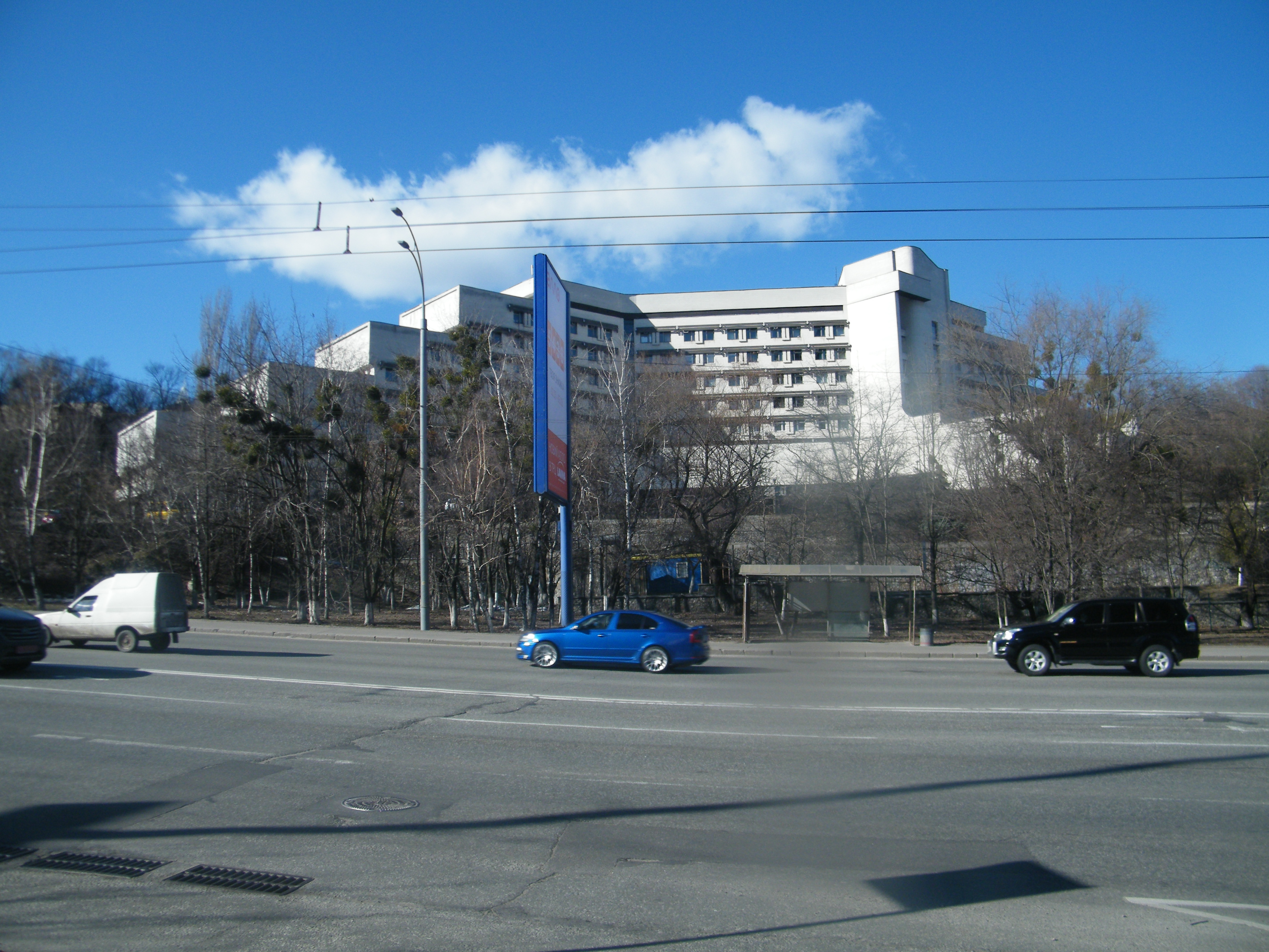 Поліклініка №1 Державного управління справами з бульвара Дружби народів